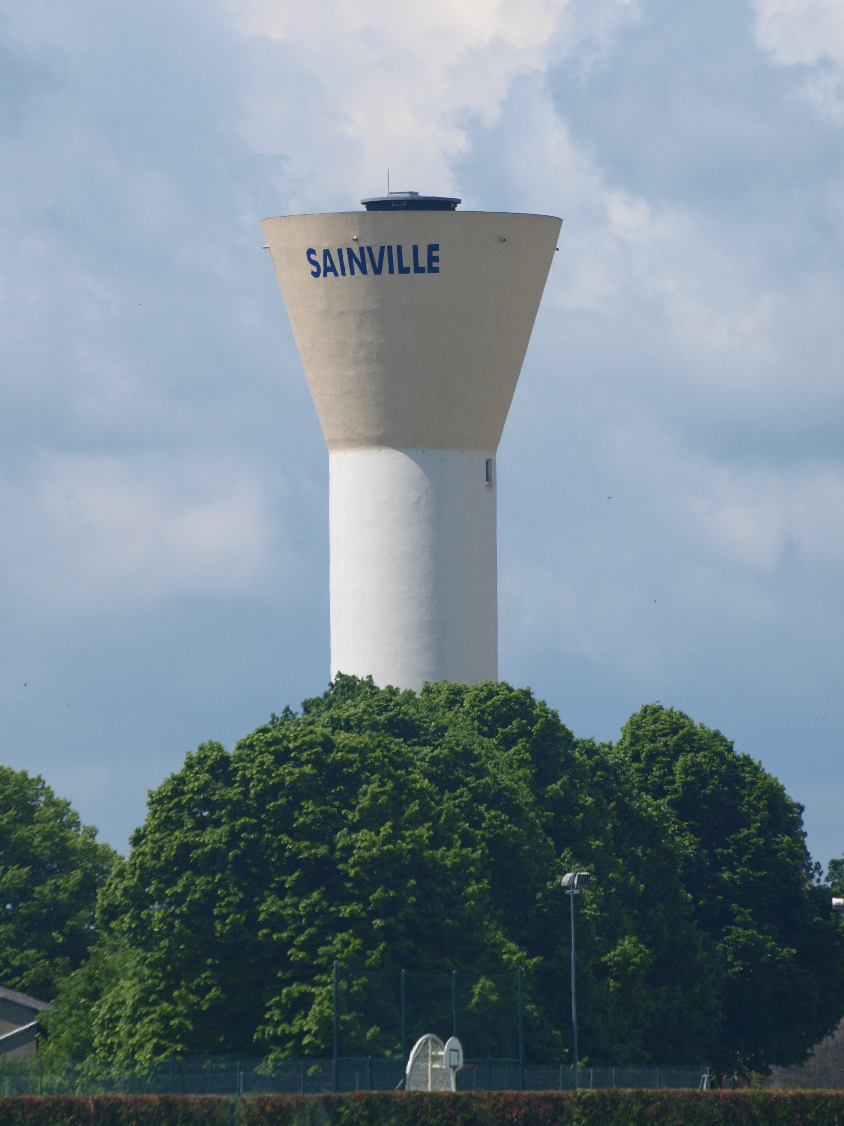 Sainville